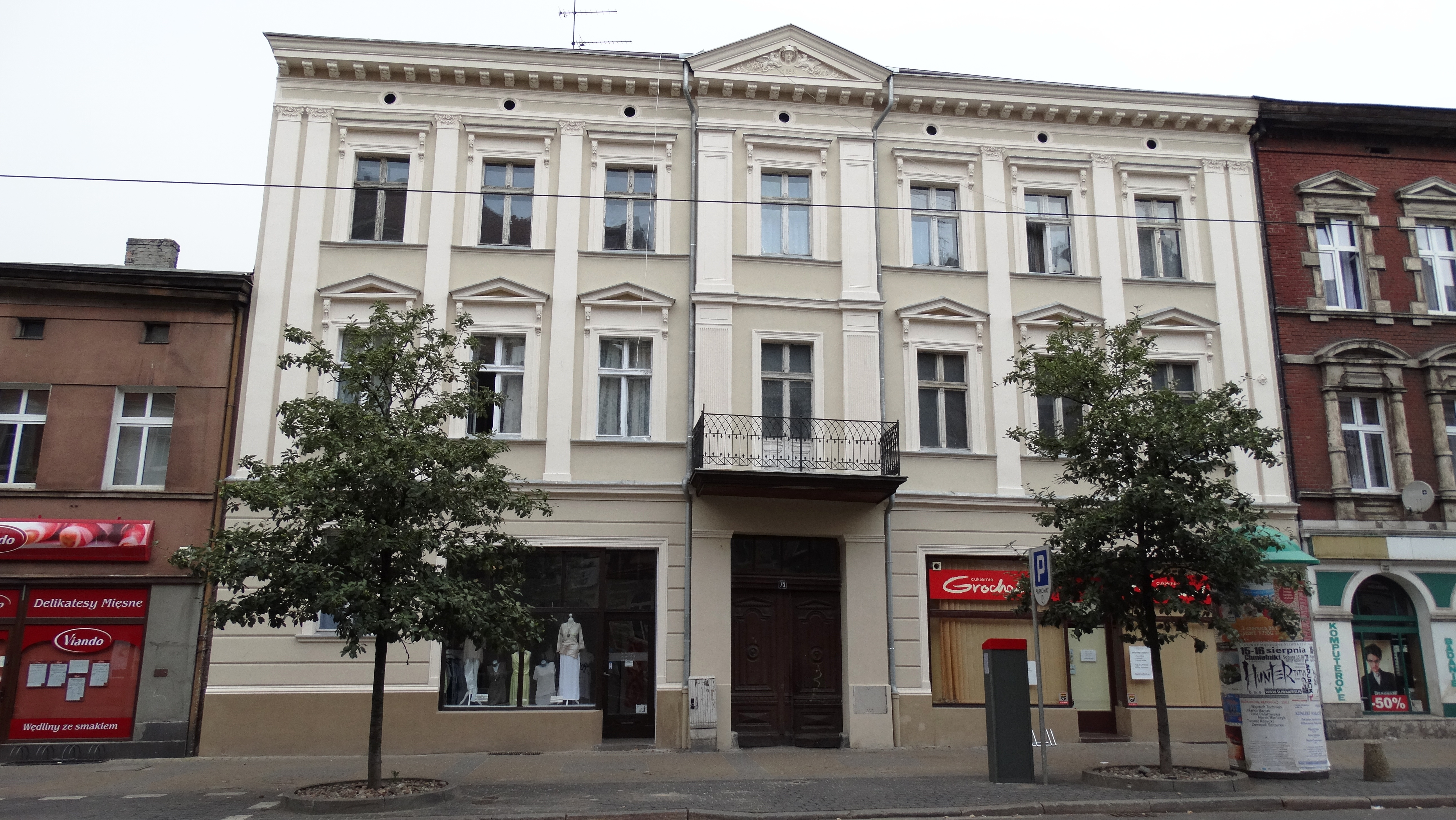 Bydgoszcz, dom, 1889